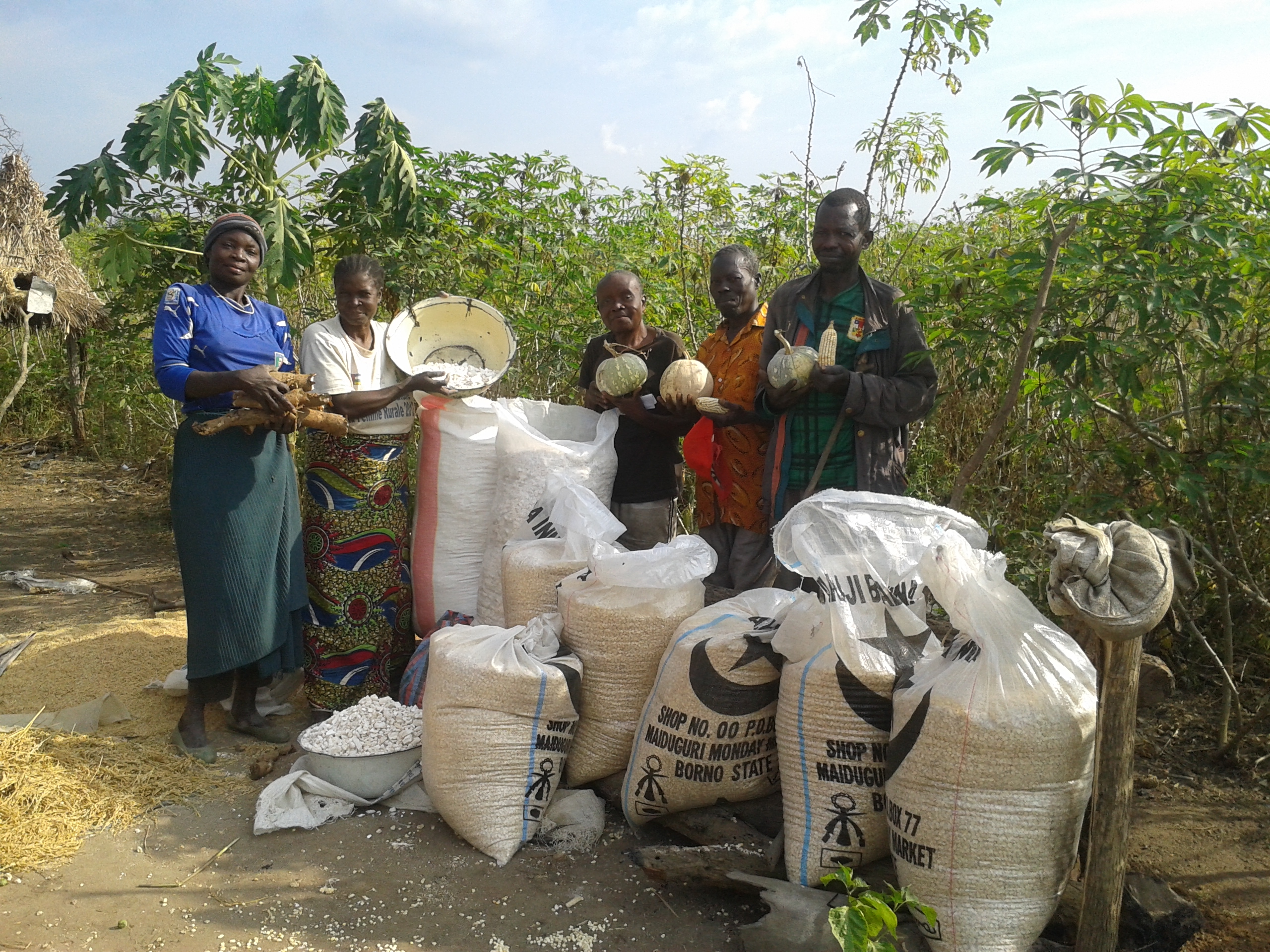 Récolte et conditionnement du manioc en Centrafrique This is an image of Cultural Fashion or Adornment from Central African Republic